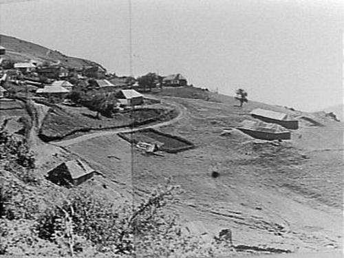 Napulitano: Dorp Barzavu in Azerbeidjan (USSR) waar de oudste man ter wereld, Shirali Mislimov (overleden september 1973) vandaan kwam